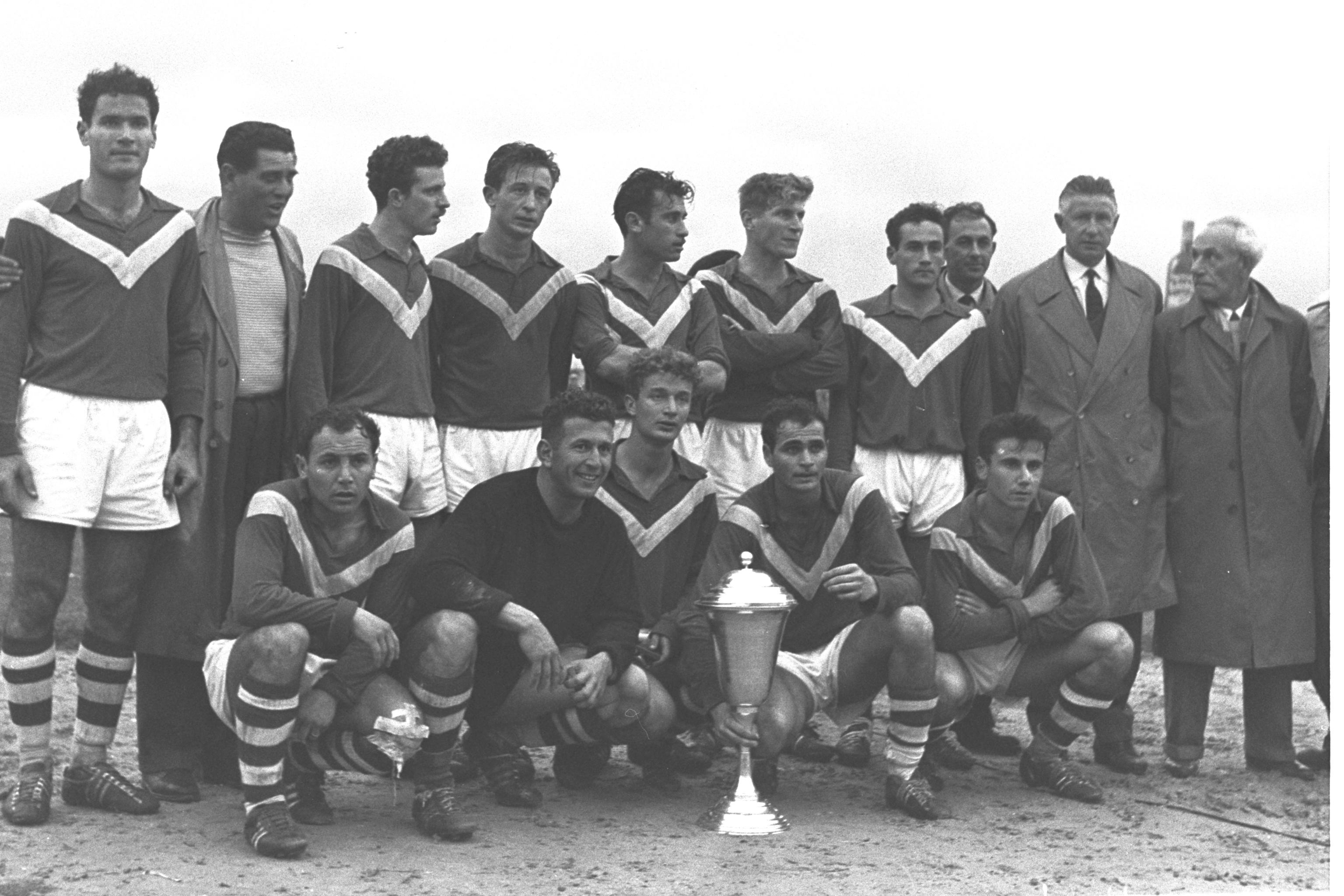 קבוצת הפועל תל אביב באיצטדיון רמת גן לפני משחק גמר גביע המדינה, 1961. המידע באתר אוסף התצלומים הלאומי על תמונה זו שגוי